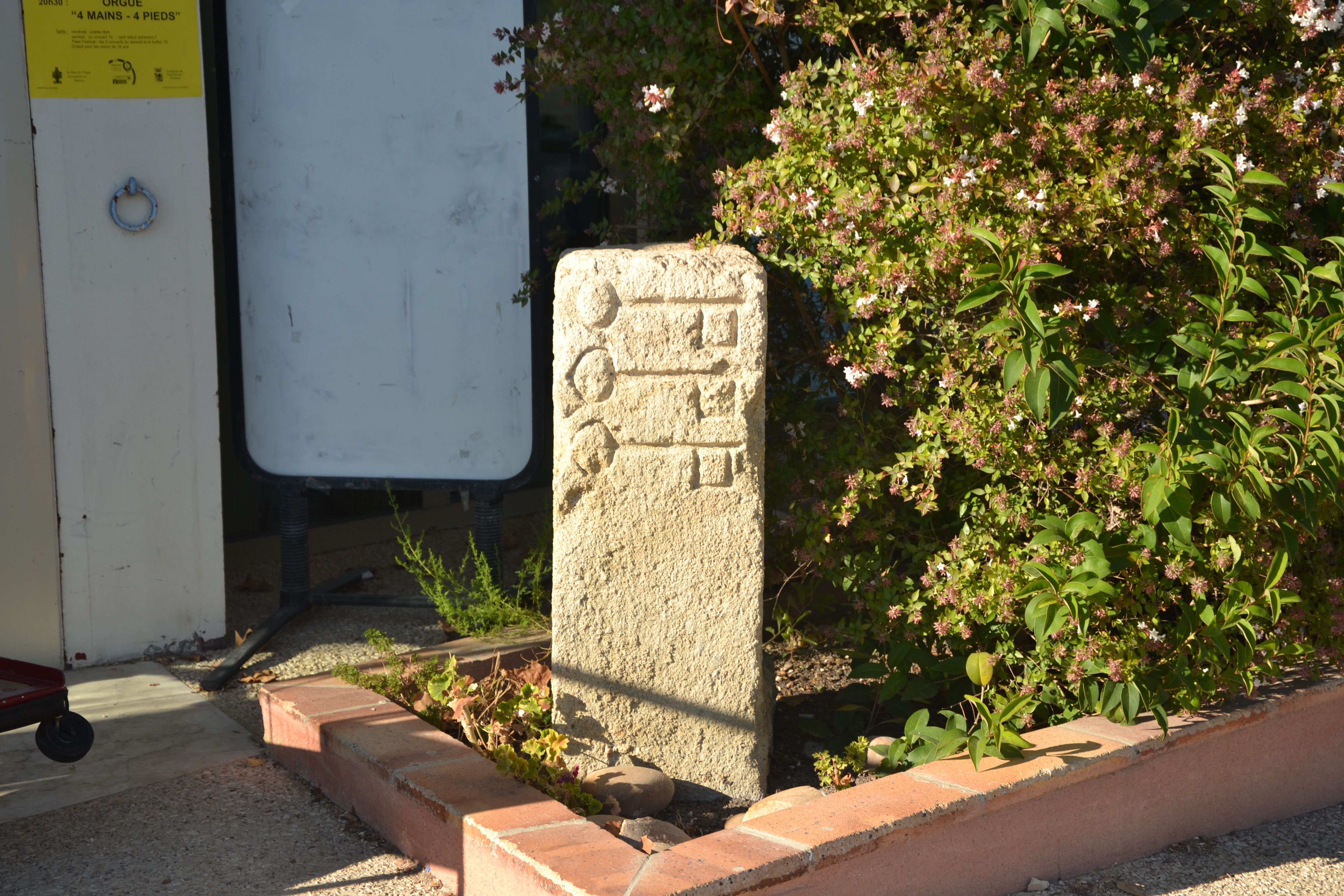 Borne pontifical à Morières lès Avignon, sur la parking de la cave coopérative viticole